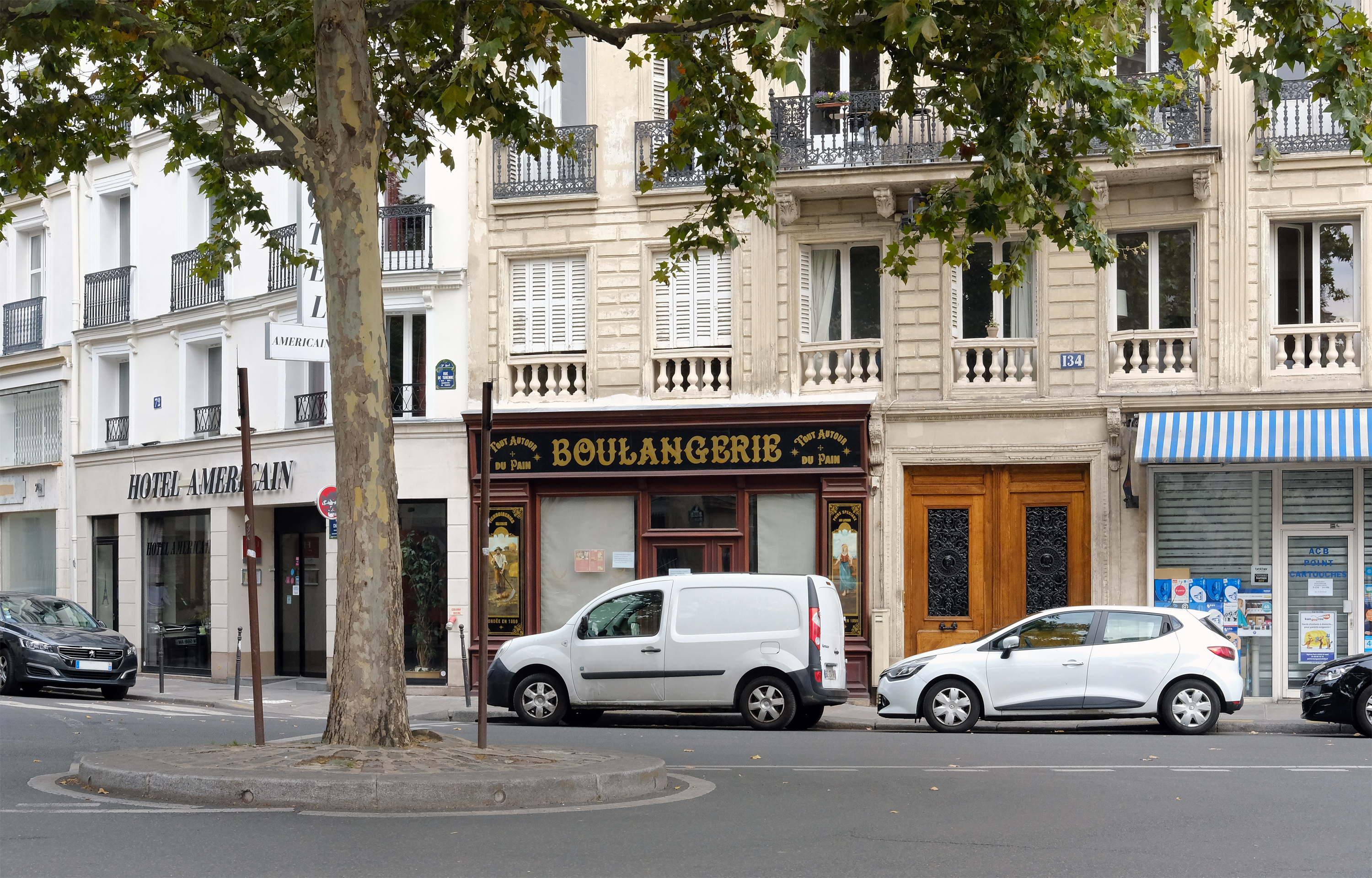 Place Olympe-de-Gouges (rond-point central) - Paris III